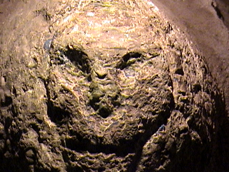 Petroglifo representando al personaje mítico Macocael a la entrada de la Cueva No.1.